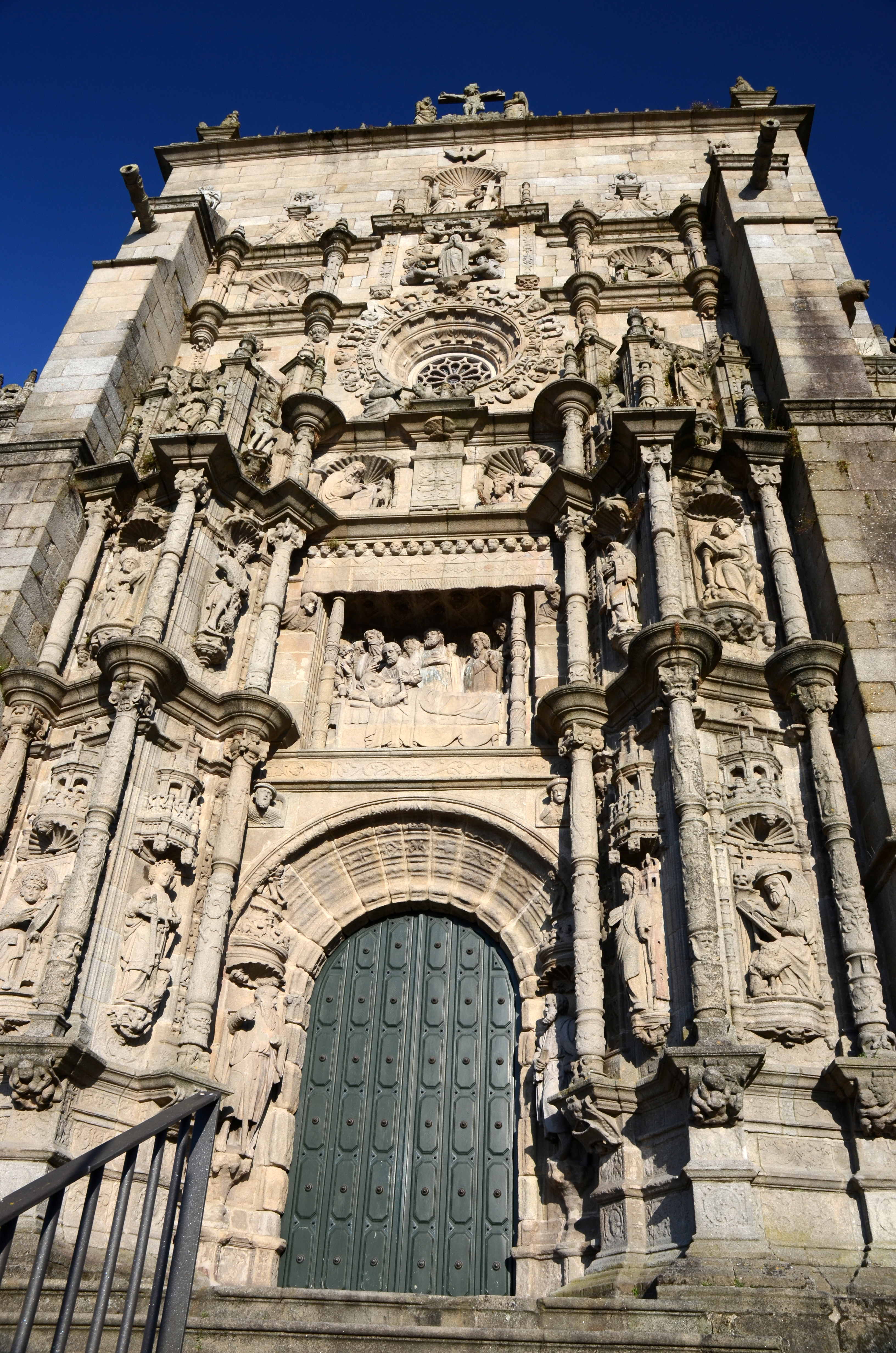 Pórtico Santa Maria la Mayor, Pontevedra